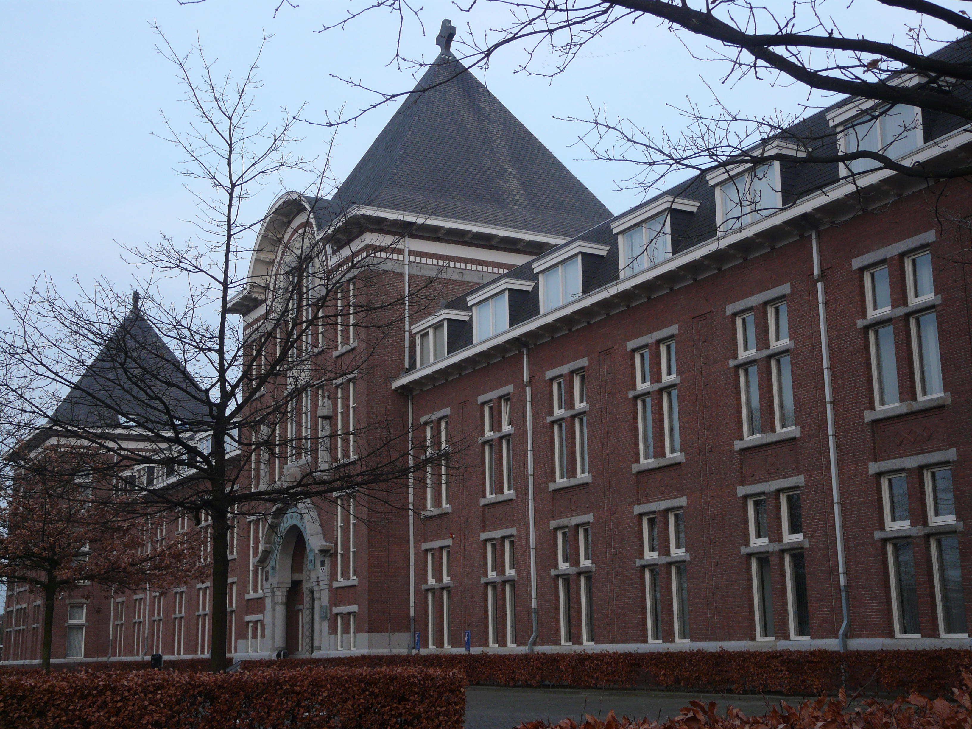 Zicht op een deel van de facade van het voormalig St.Ignatius ziekenhuis en de huidige ingang van het Florijn College, gevestigd in de Wilhelminasingel 33 in Breda. Gelegen nabij het centrum van Breda